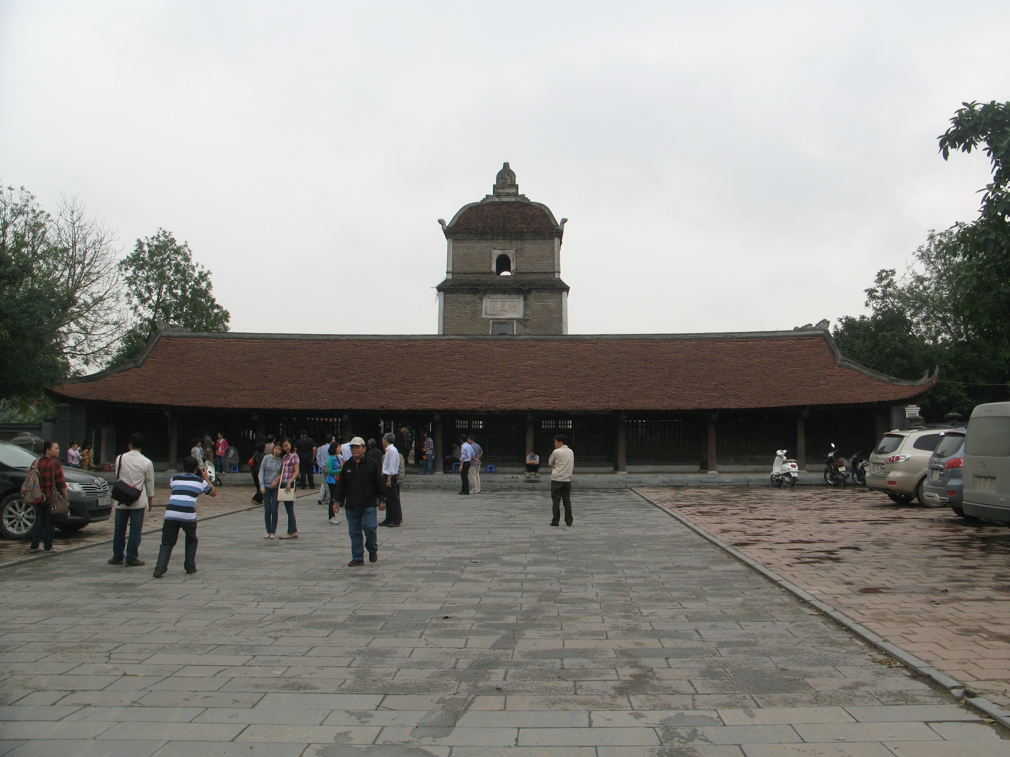 Chùa Dâu thuộc huyện Thuận Thành, Bắc Ninh: nhìn tòan cảnh